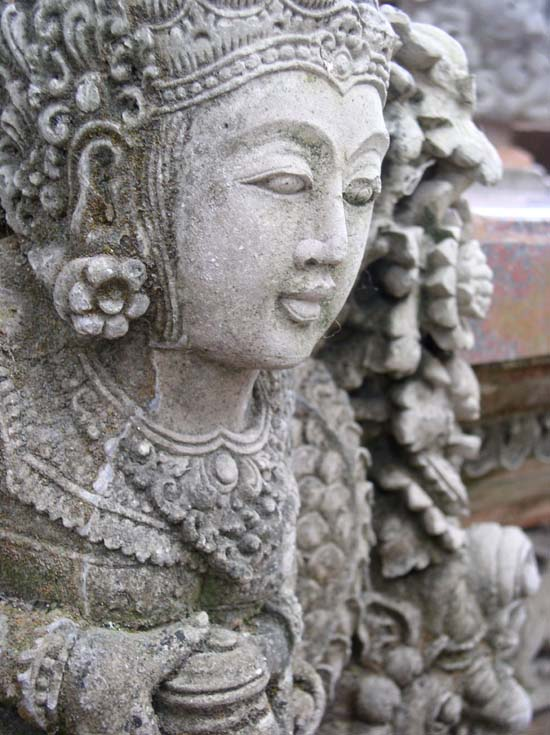 Balinese stone guardian: at Puri Saren Agung (Ubud Palace).